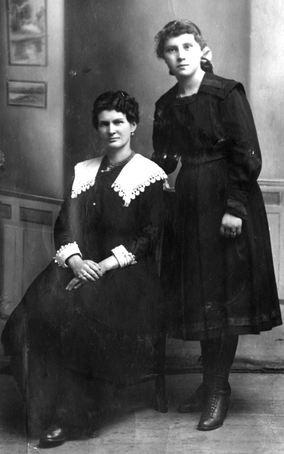 Maria Grodzka Helena Dudzińska